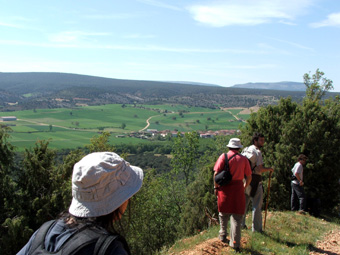 El Camino del Cid por sendero